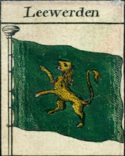 Vlag van Leeuwarden, volgens Bowles's naval flags of the world, 1783